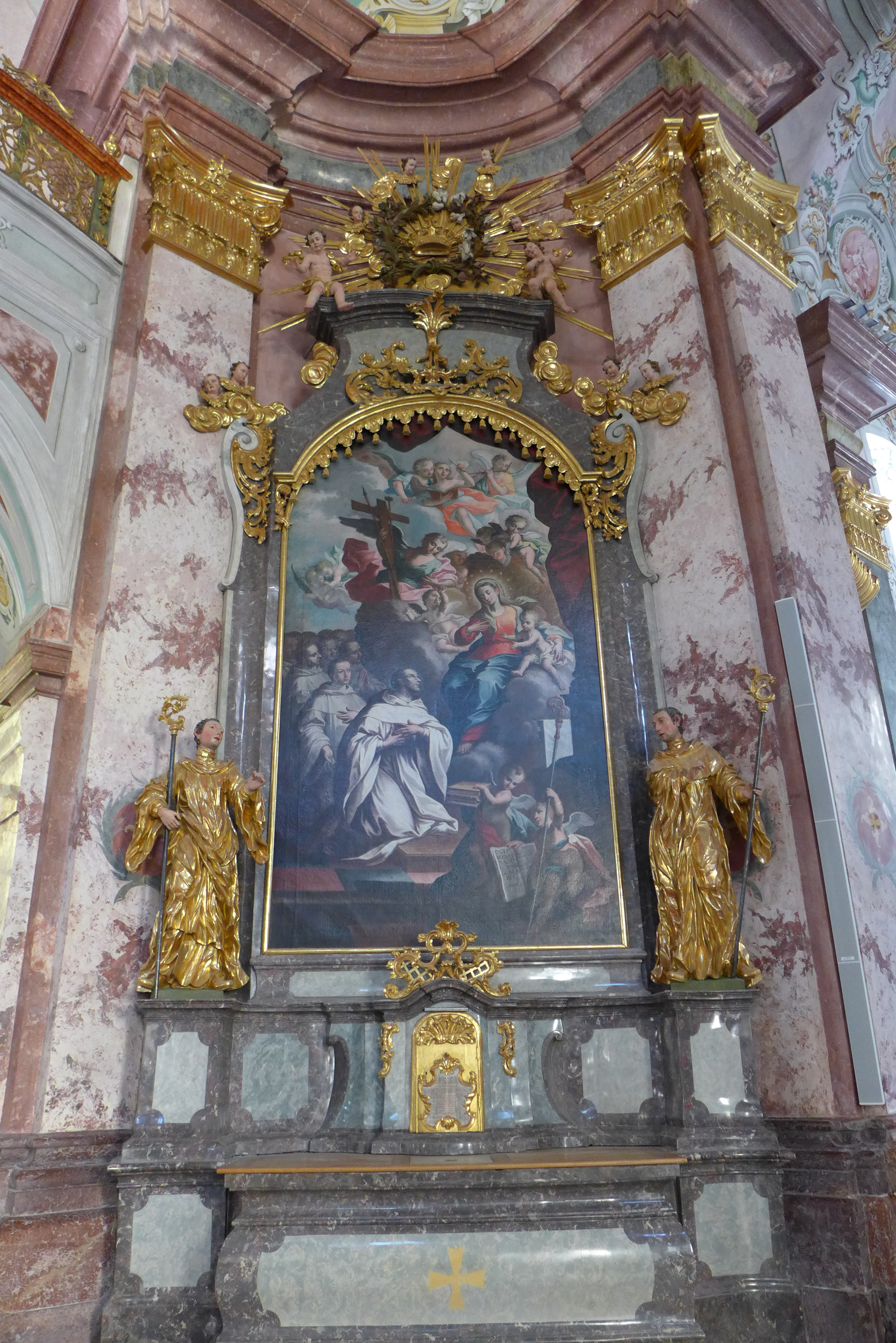 Stiftskirche Rein - linker Seitenaltar